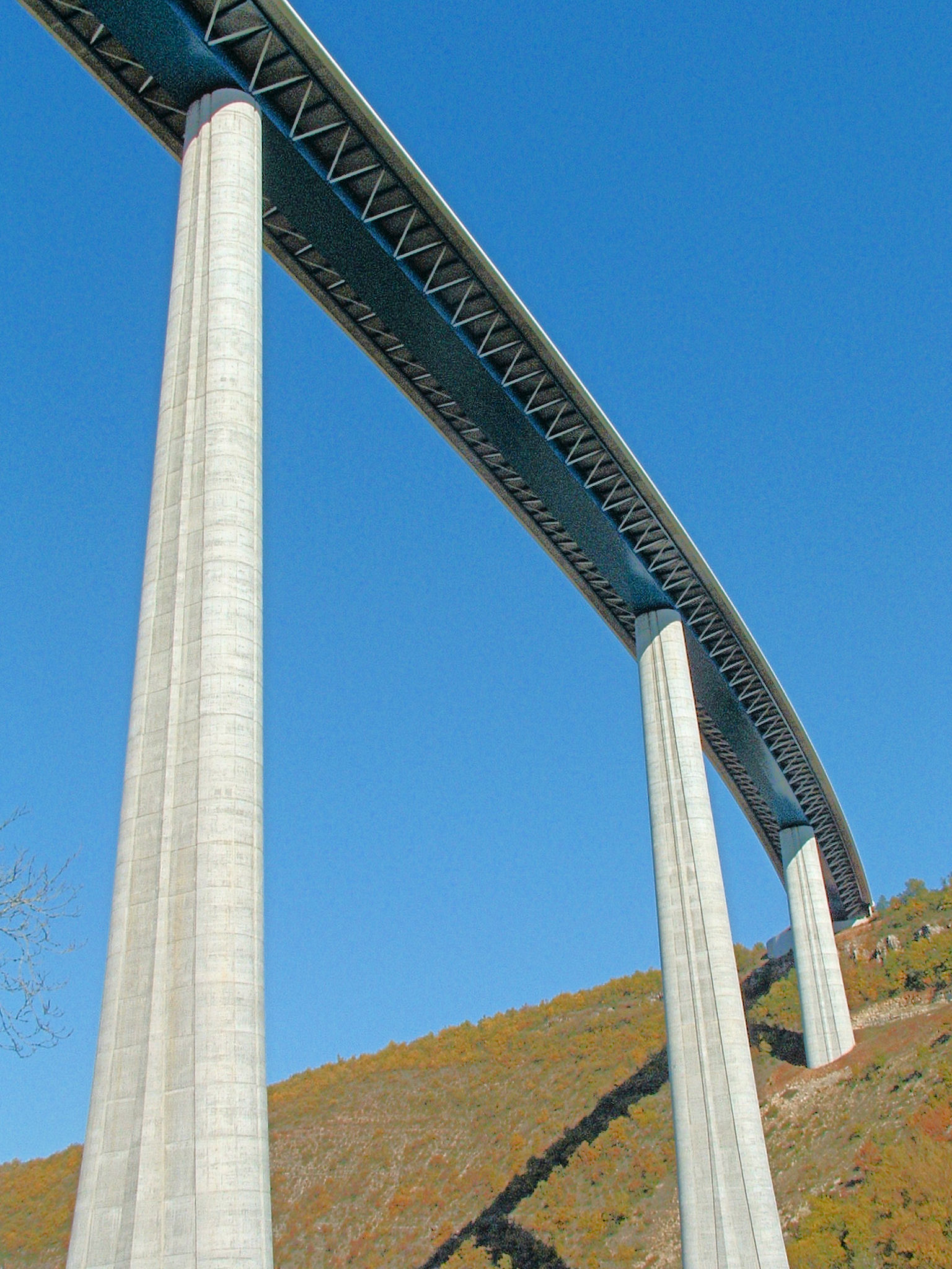 Autoroute A75 - Viaduc de Verrières